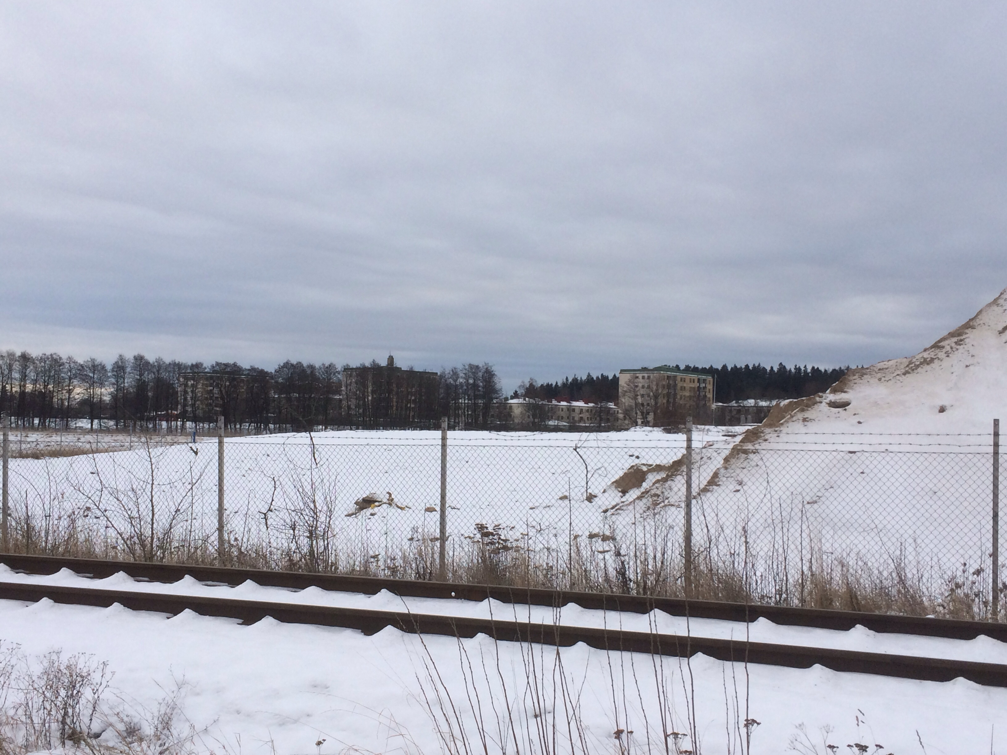 Vy lver Johannelund